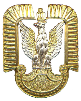 Symbol Polskich Sił Powietrznych